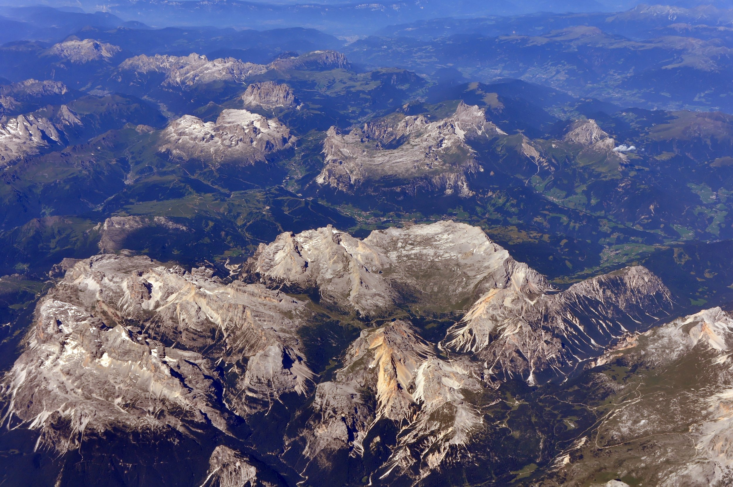 Bilder vom Flug Hannover Rom August 2014